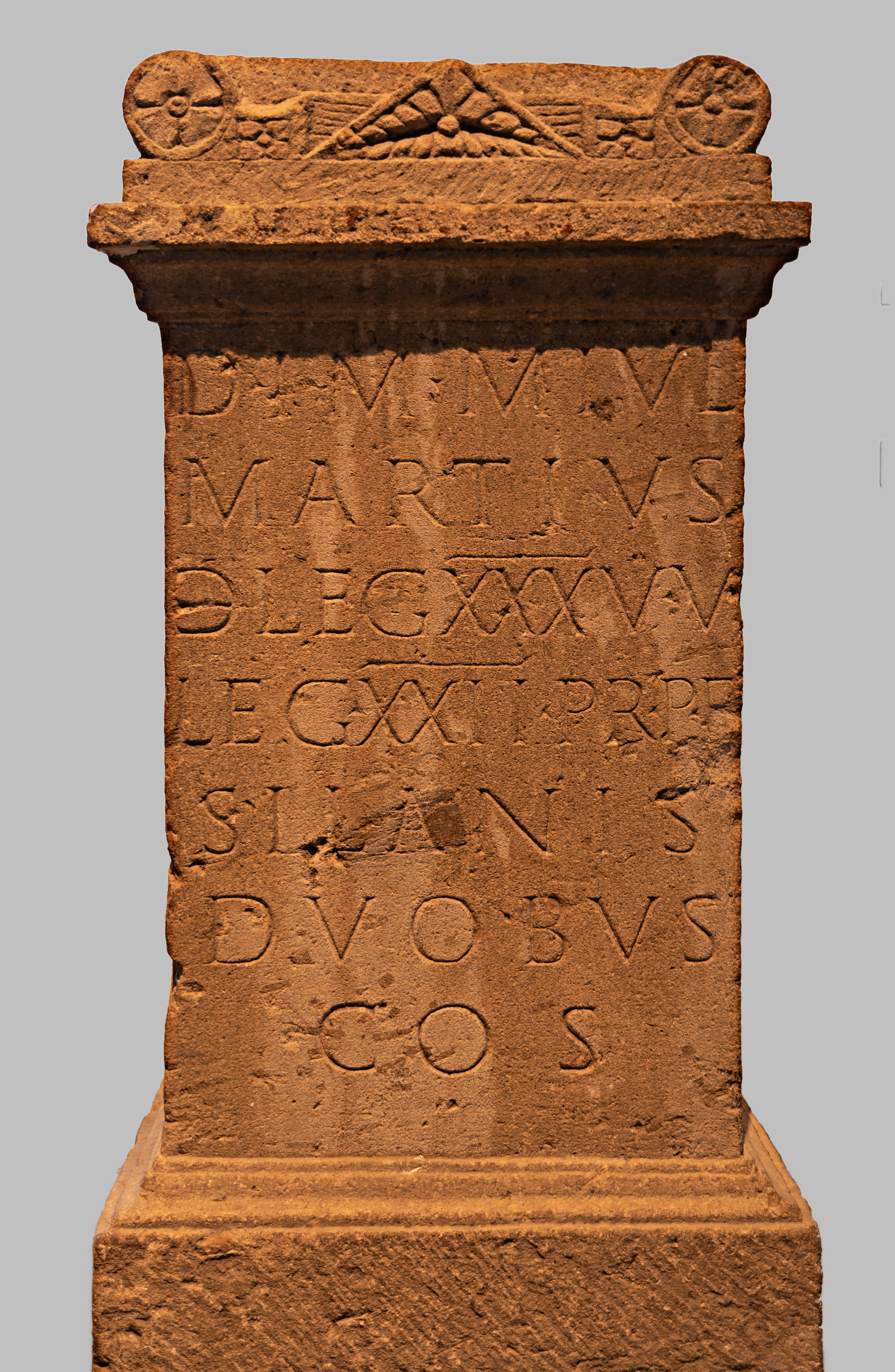 Ein Weihealtar von 189, aus dem Jahr als Dulius Silanus und Servilius Silanus (duobus Silanis) das ordentliche Konsulat ausübten. Der Altar wurde von Marcus Iulius Martius für die römische Gottheit Mithras gestiftet und bei Xanten aufgestellt. Der Soldat war Zenturio in der Legio XXX Ulpia Victrix und in der Legio XXII Primigenia (CIL 13, 08640). Der Weihaltar ist im LVR-RömerMuseum Xanten ausgestellt.